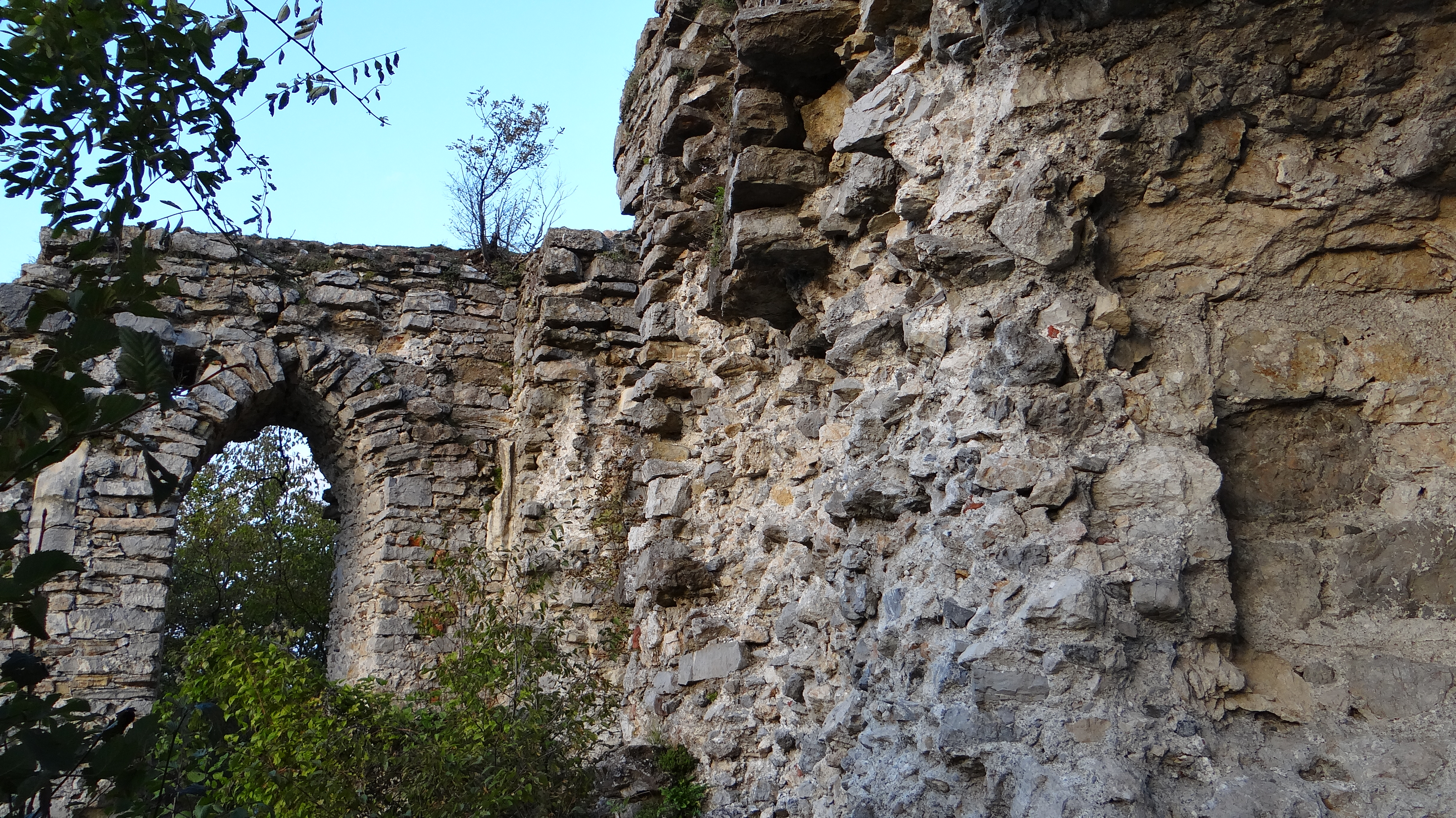 Grad Cesargrad V. 2013